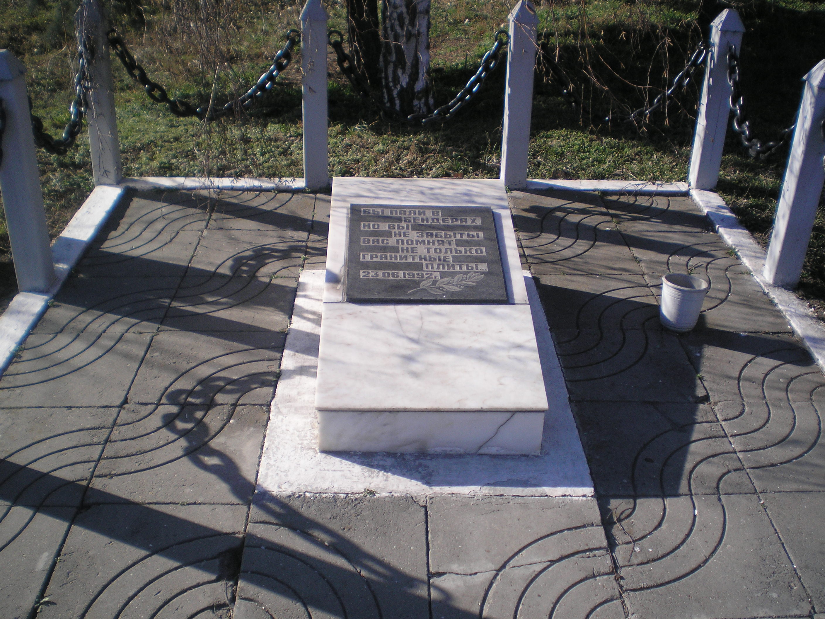 Памятник защитникам Приднестровья в Бендерах (ПМР)